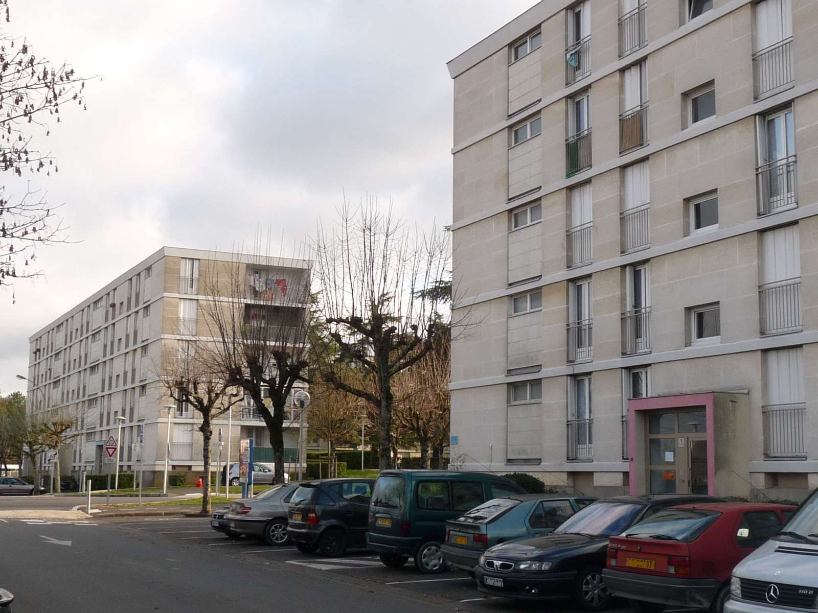 cité du Champ de Manoeuvres, Soyaux, Charente, France